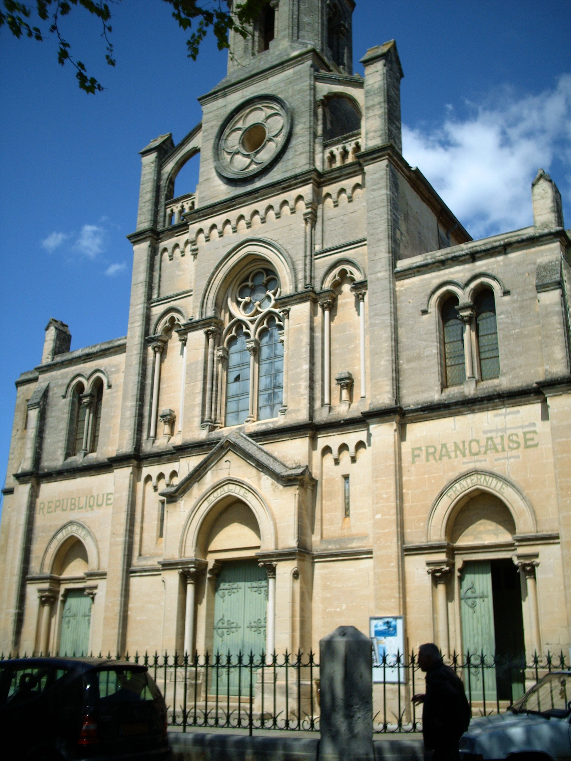 L'église Saint-Saturnin d'Aimargues (Gard)